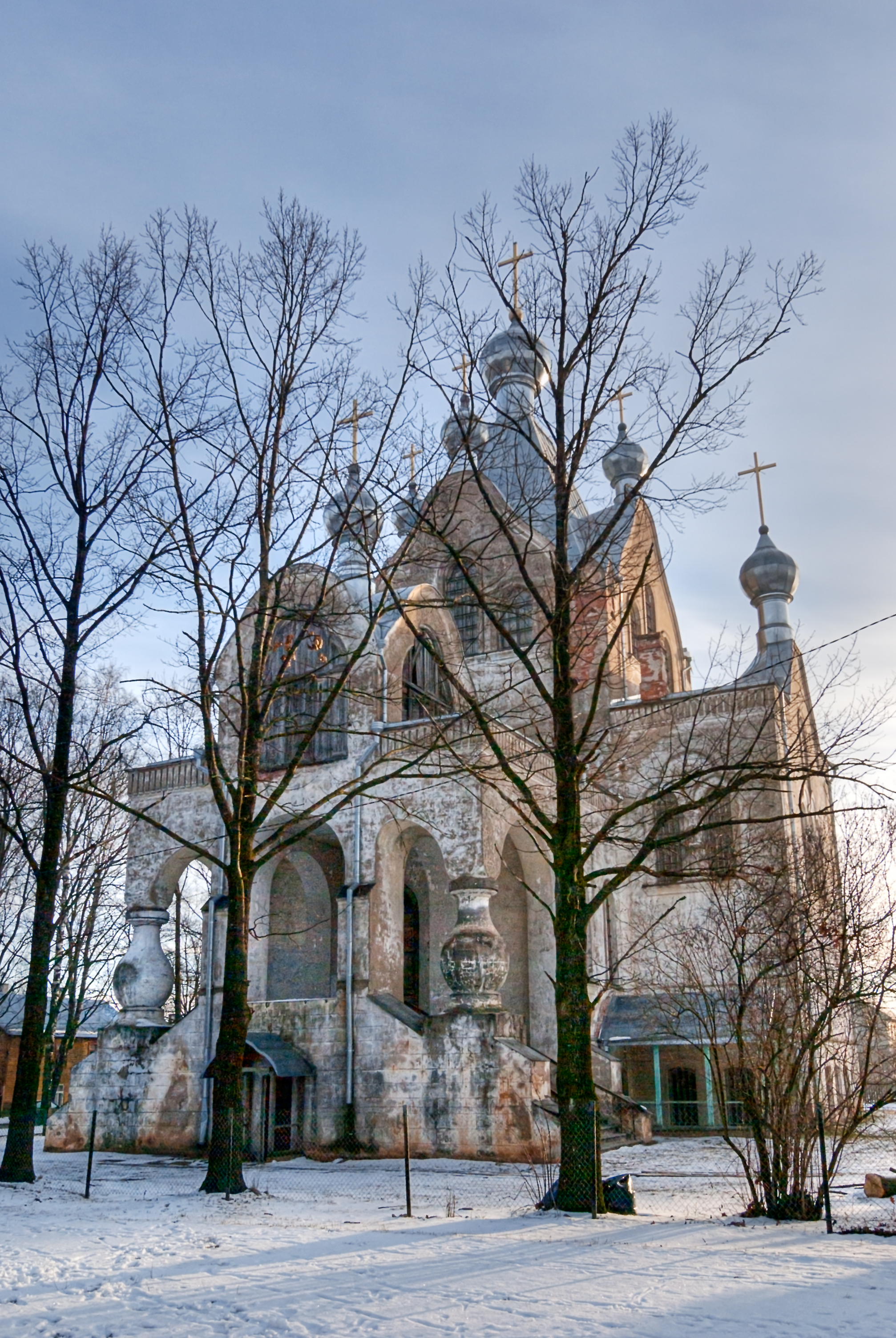 Tartu Aleksandri kirik 1914-1915.